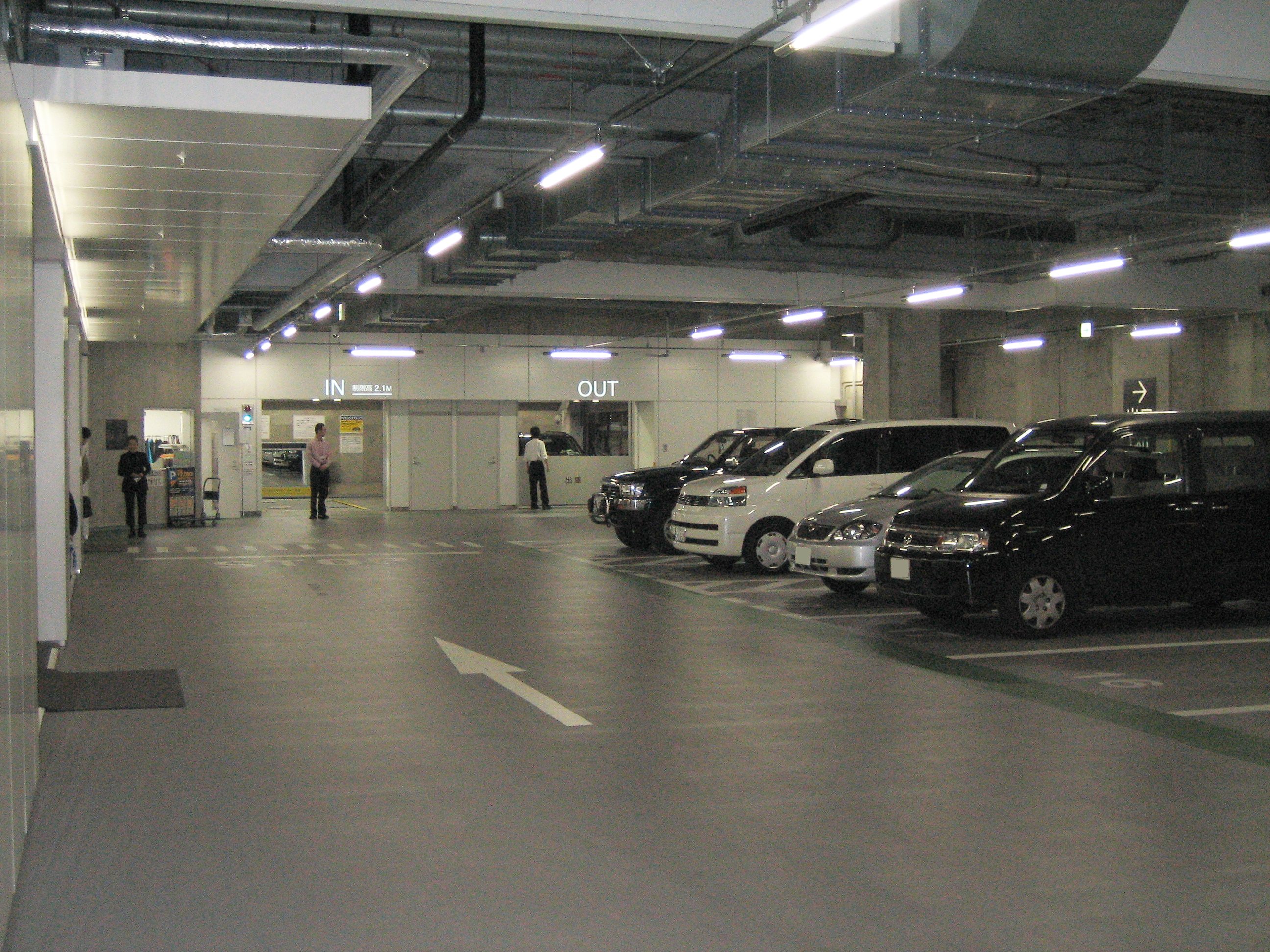 秋葉原ダイビル駐車場 秋葉原クロスフィールド地区:秋葉原ダイビルにある地下駐車場。自走式と機械式を組み合わせた駐車場。 所在地：東京都千代田区 外神田1-18-13 階数：地下1階 収容台数：112台